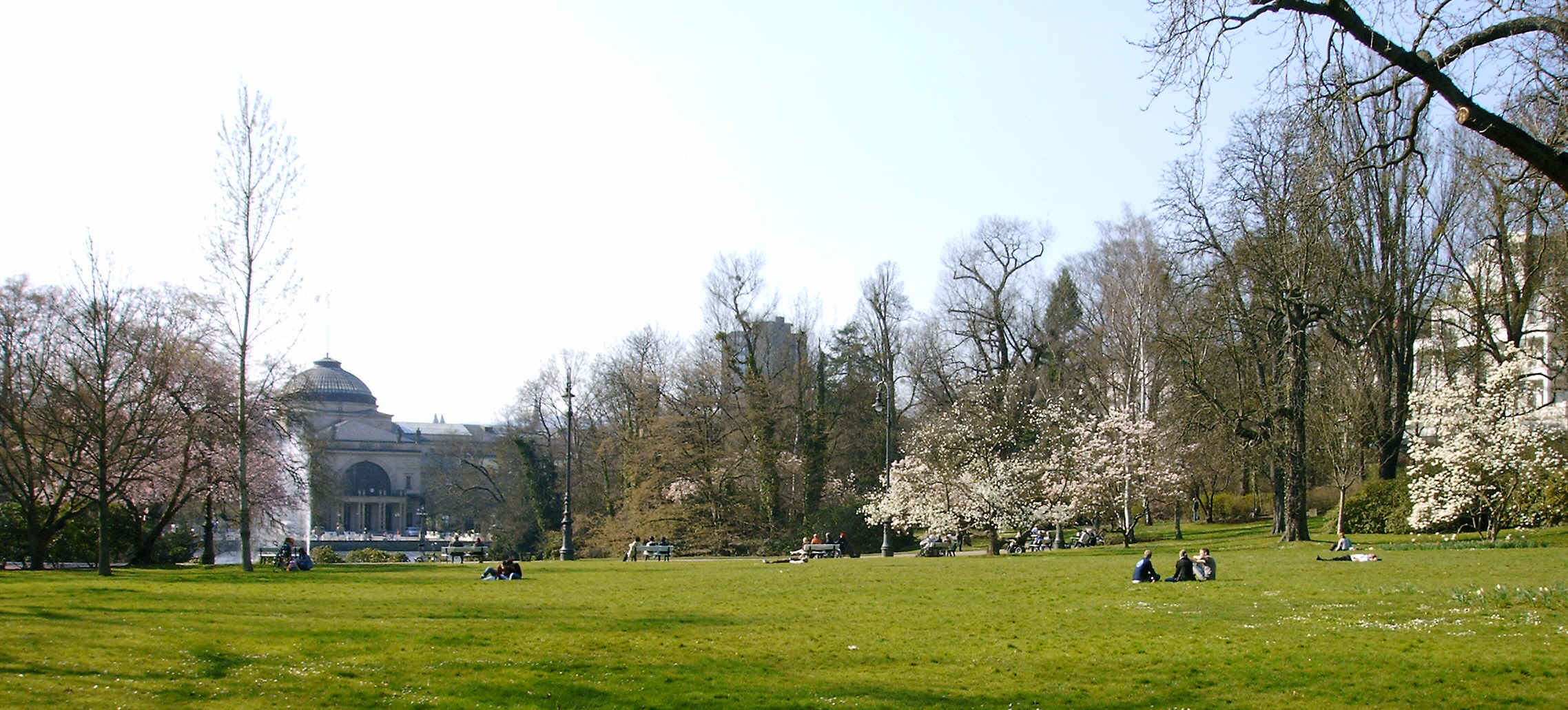 Wiesbadener Kurpark mit Teich und Rückseite des Kurhauses im Hintergrund im Frühjahr während der Baumblüte. 26.3.2007